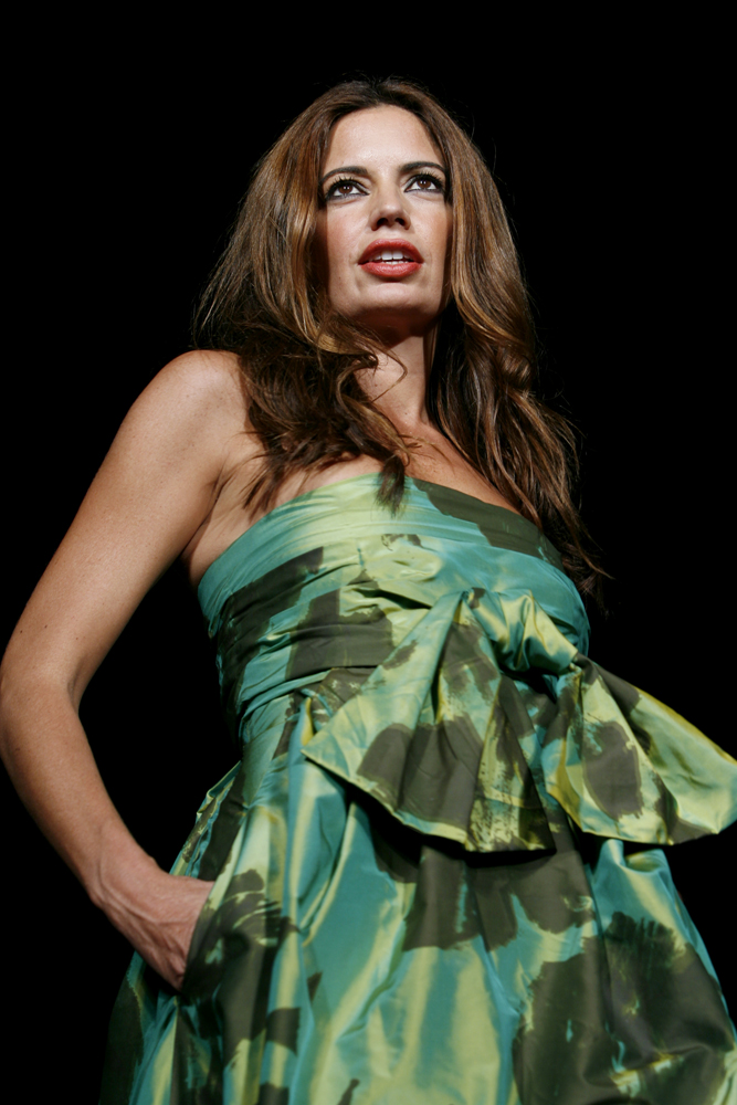 Bárbara Guimarães na Moda Lisboa 2008, desfilando para José António Tenente.